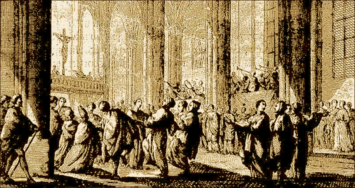 Fête des fous dans l'église cathédrale de Nîmes, Histoire de Nîmes, Ménard Tome 3, 1752